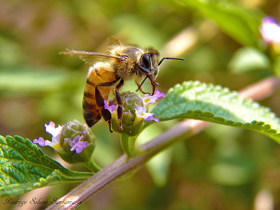 500px provided description: Polinizacion